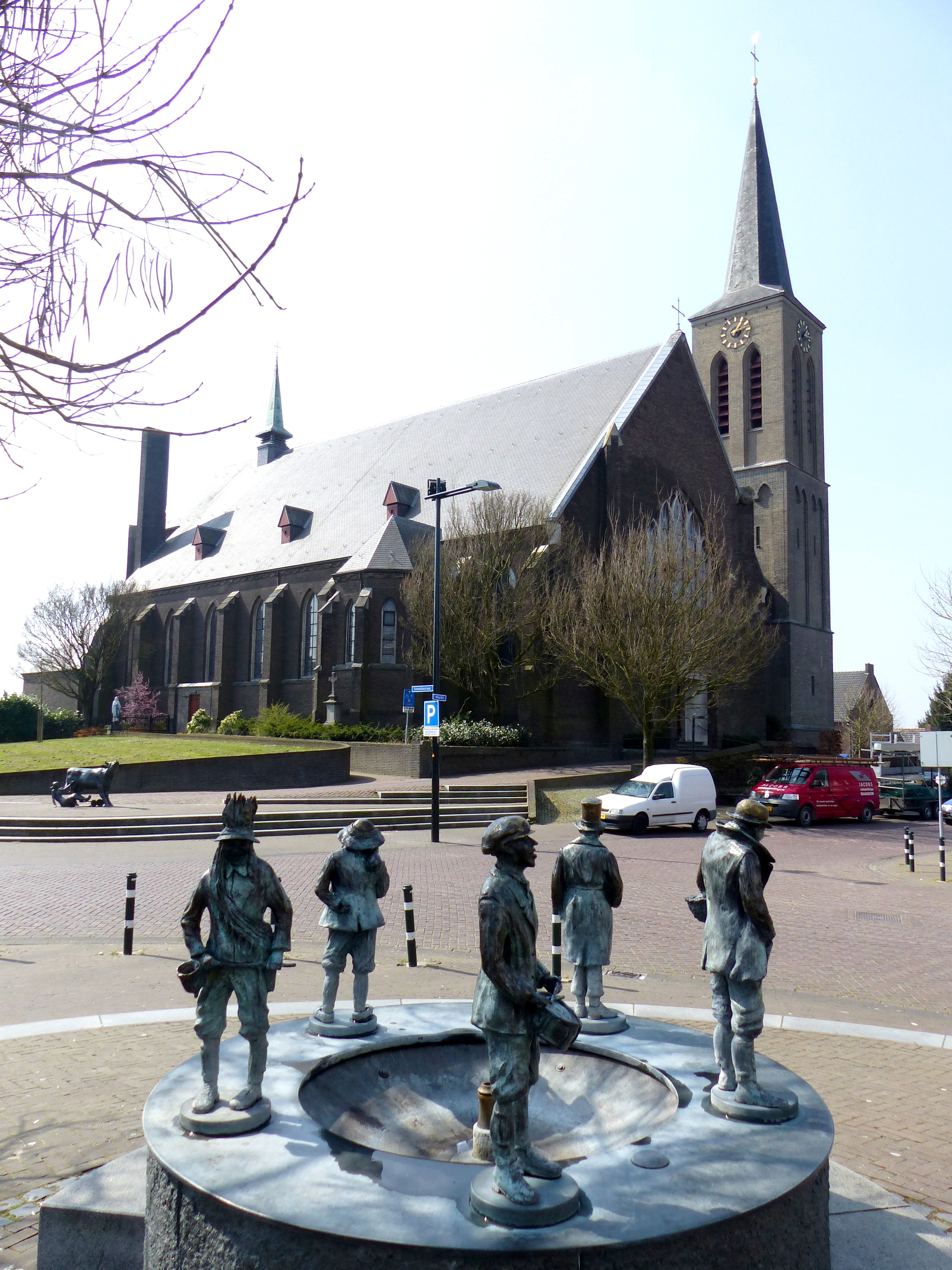 Velden – NL - Bierfontein en op de achtergrond de Sint-Andreaskerk uit 1933 op de Markt in Velden